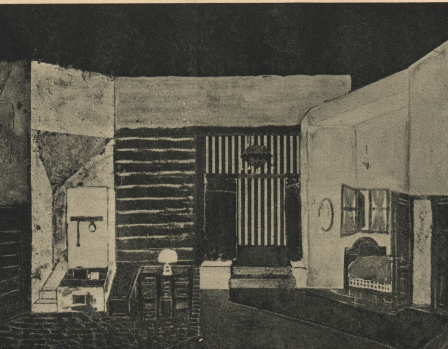 Scéna ke hře "Jak nás poznamenala", 1926